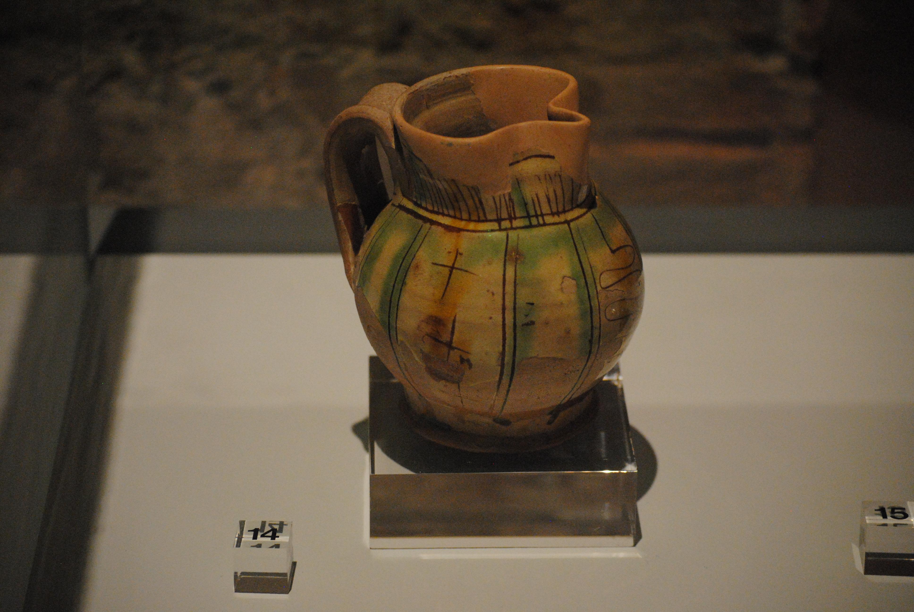 Boccale ingobbiato e graffito a punta, risalente agli inizi XVI secolo (restitutito dagli scavi dell'ex monastero delle Benedettine, Pisa) - Museo nazionale di San Matteo.